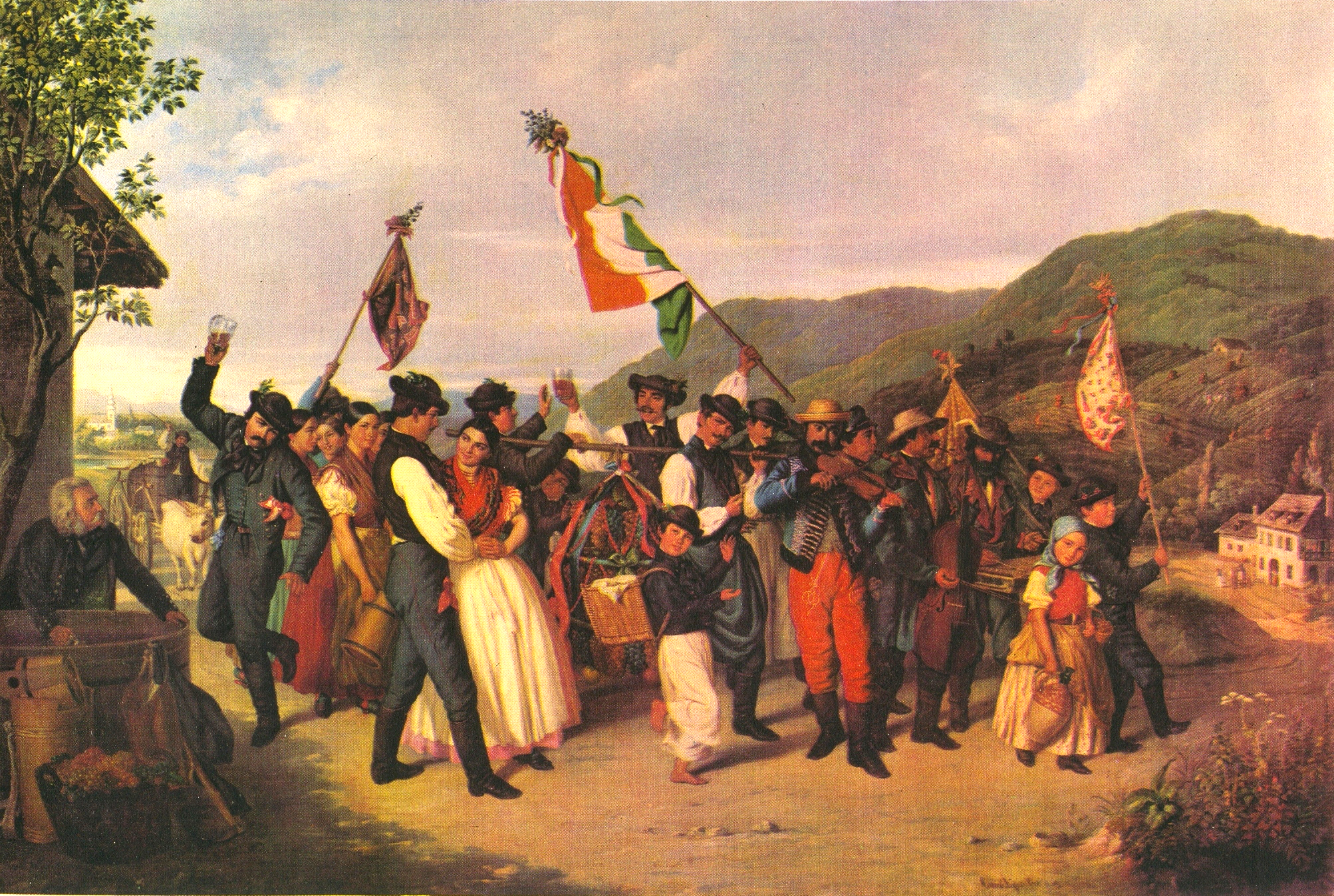 Szüret Vác vidékén, olajfestmény, Canzi Ágost, Szépművészeti Múzeum